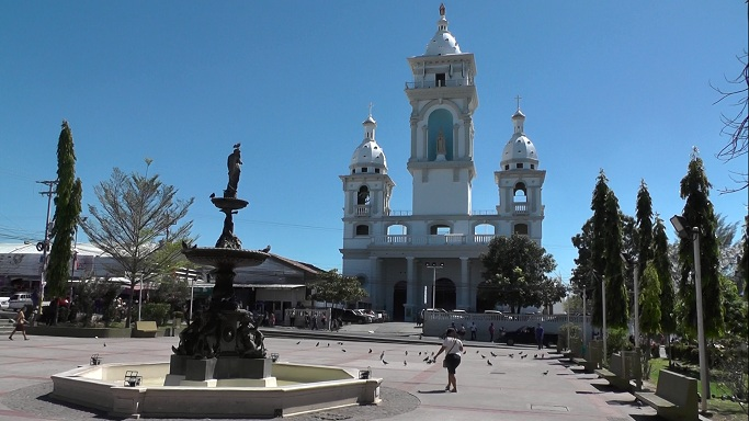 Vista de la Catedral de Zacatecoluca y Fuente de Neptuno